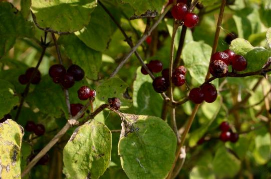 From Billede:Lonicera-xylosteum.JPG, by Bruger:Sten